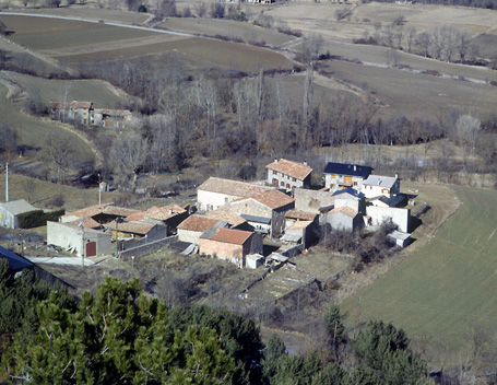 Fotografia d'Olià, abans de la massificació, fa 40 anys.